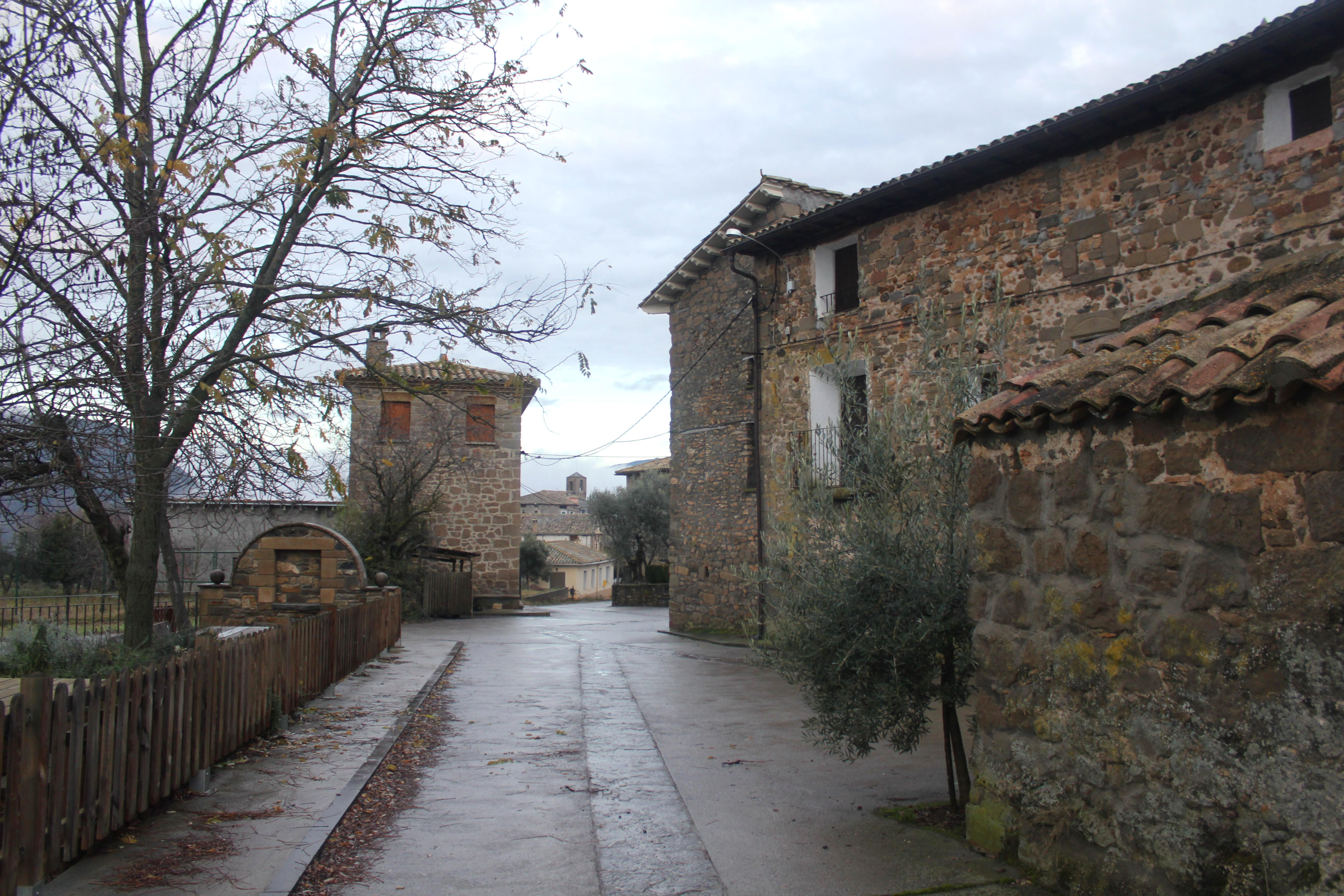 Aragonés: Lamata